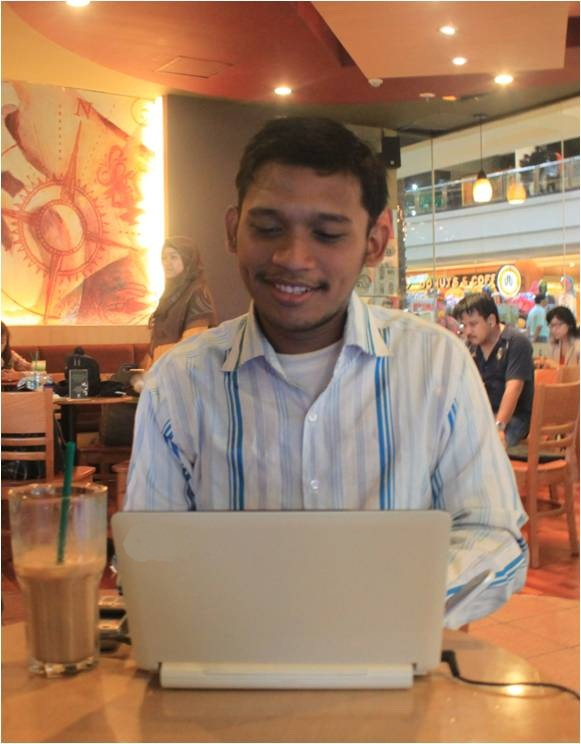 Bekerja di kafe dengan telecommuting, tak perlu ke kantor